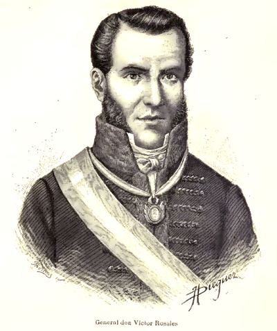 Imagen de Víctor Rosales extraida de Vicente Riva Palacio, Julio Zárate (1880) "México a través de los siglos" Tomo III: "La guerra de independencia" (1808 - 1821)